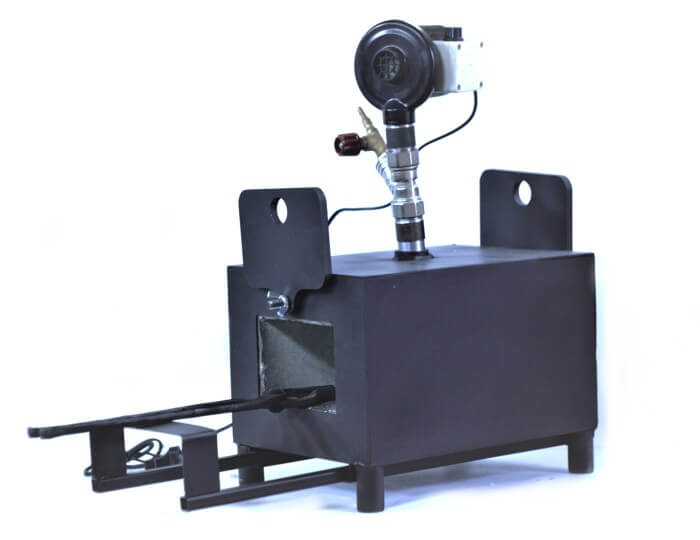 Современный переносной газовый кузнечный горн